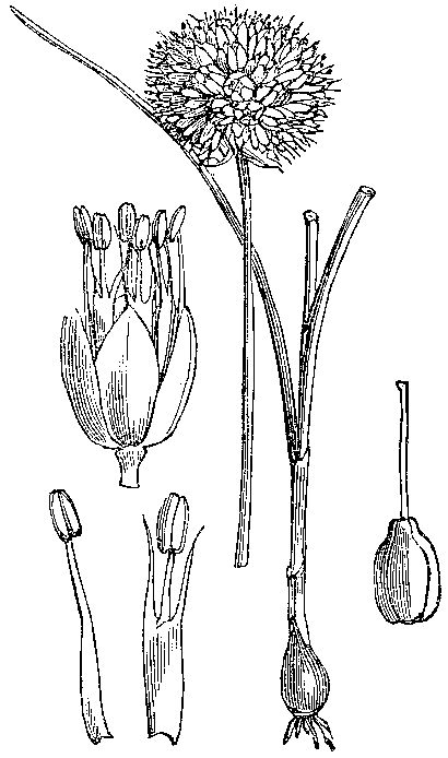 Slika 309. Obličasta čebula. (Állium sphaerocéphalum.) [sic!]